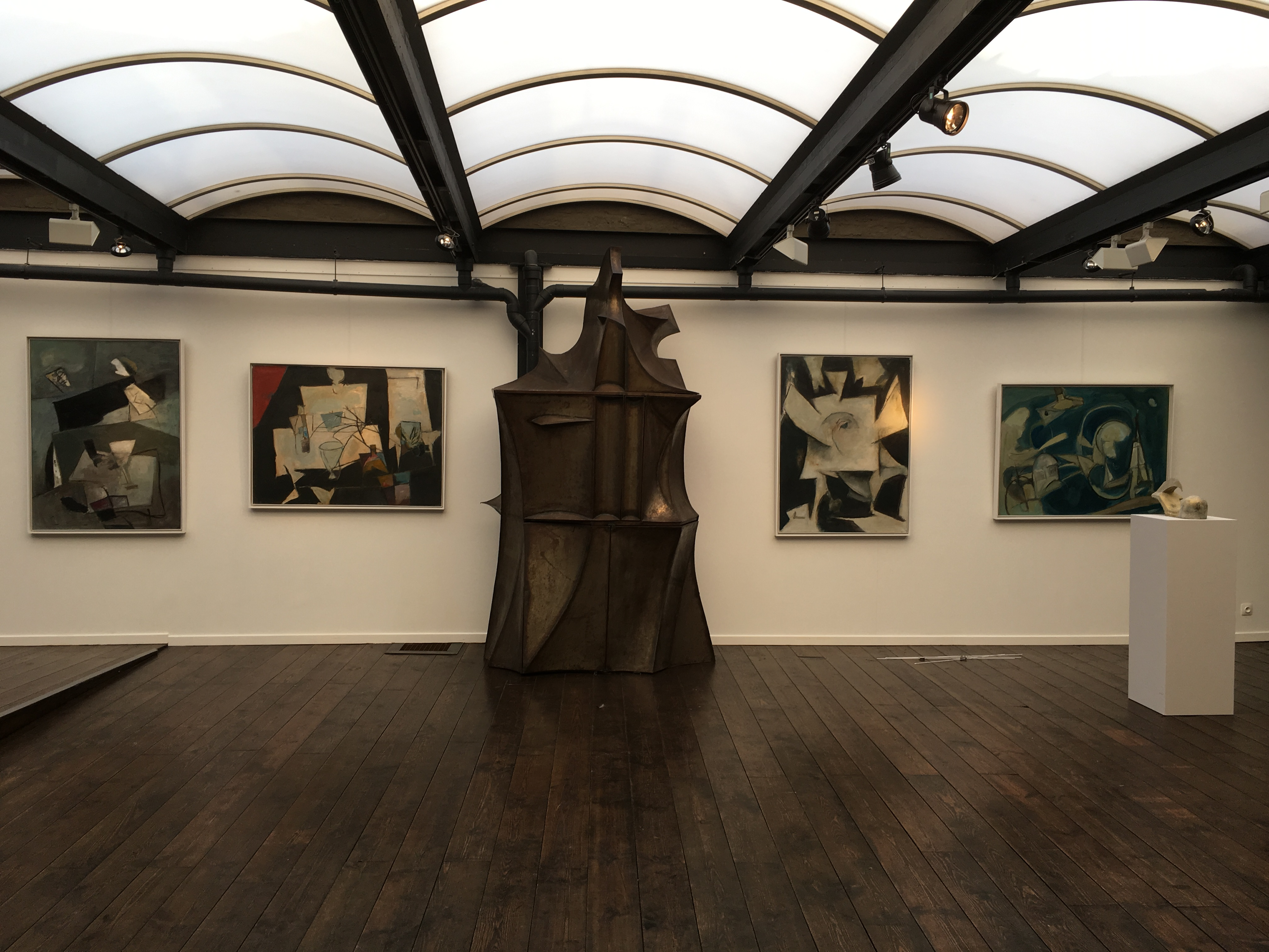 Une photo d'une partie de l'exposition d'André Queffurus réalisée en février/mars 2016 à la galerie MB-XL Contemporary & Modern située à Ixelles en Belgique.